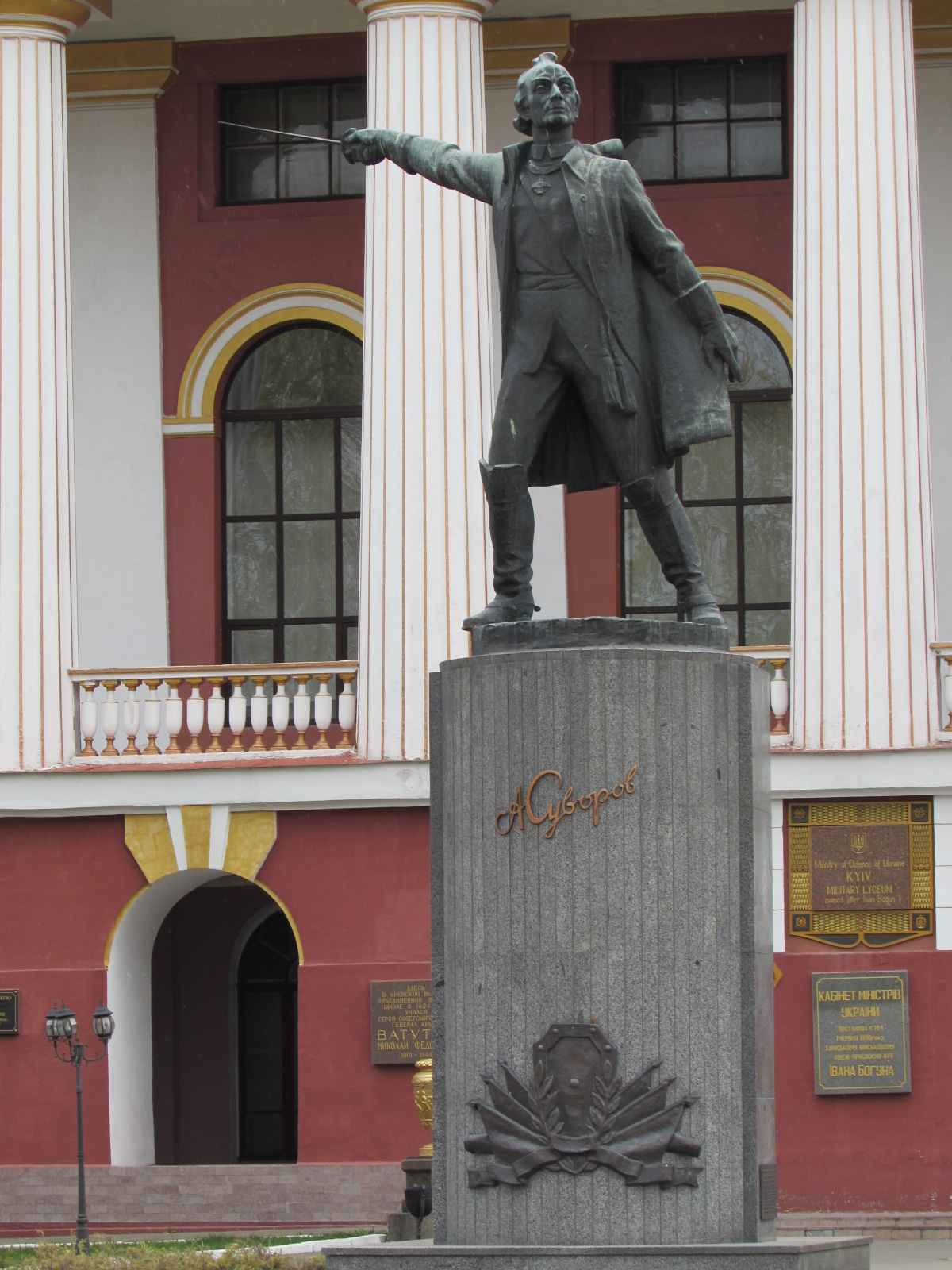 Пам'ятник російському полководцю, генералісімусу О. В. Суворову, Київ, Лесі Українки бульв., 25